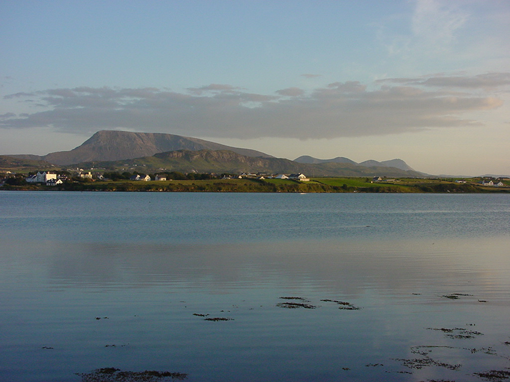 Dunfanaghy Bay